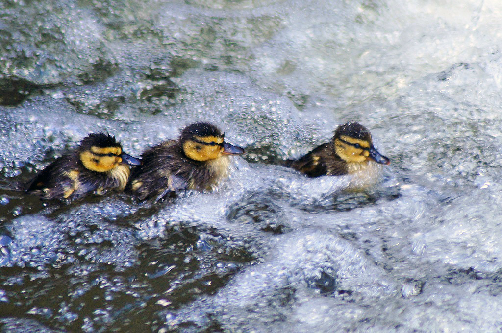 Kilkudniowe pisklęta krzyżówki Anas platyrhynchos